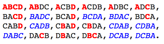 24 התמורות של הסדרה {A,B,C,D}, מתוכן מסומנים בכחול הבלבולים